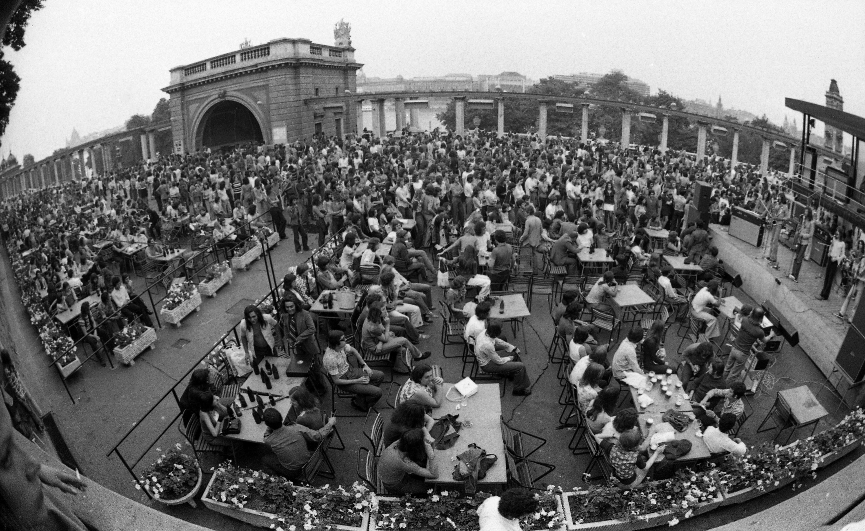 Várkert Bazár, Budai Ifjúsági Park. A színpadon az M7 együttes